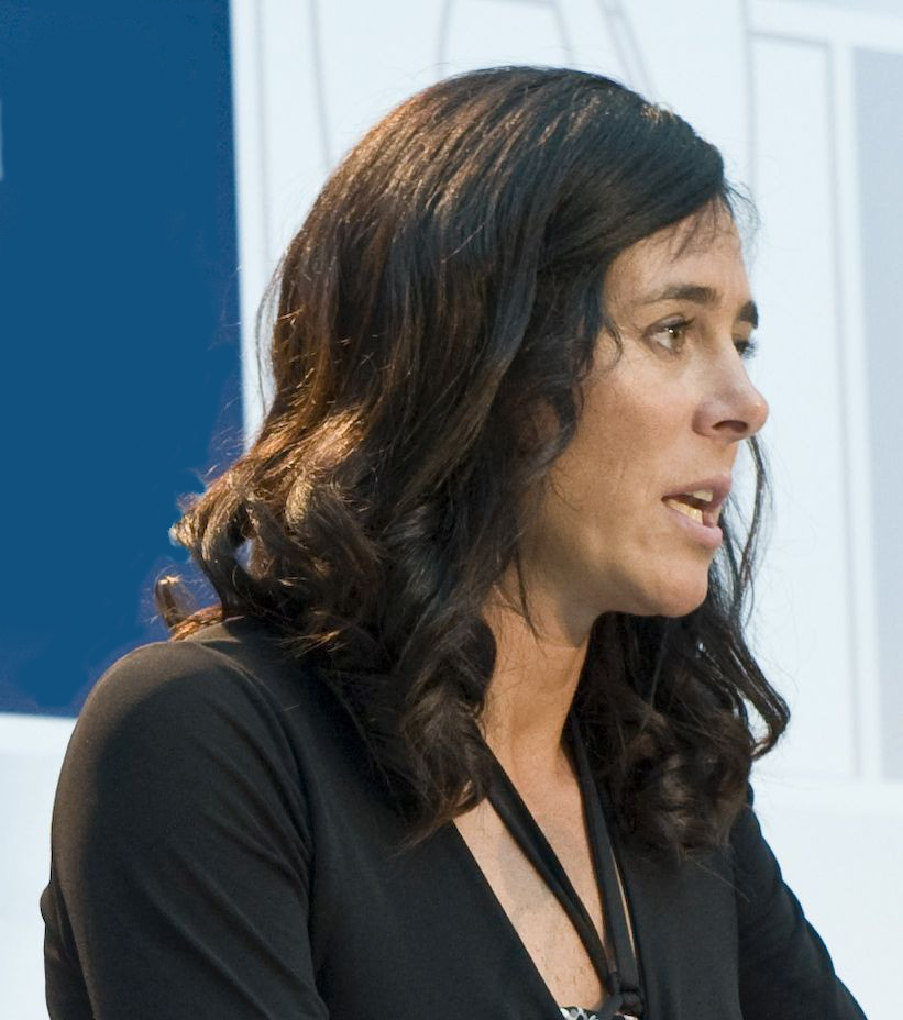 Edurne Pasabanek Euskal Herritar Unibertsalaren Saria jaso du 4